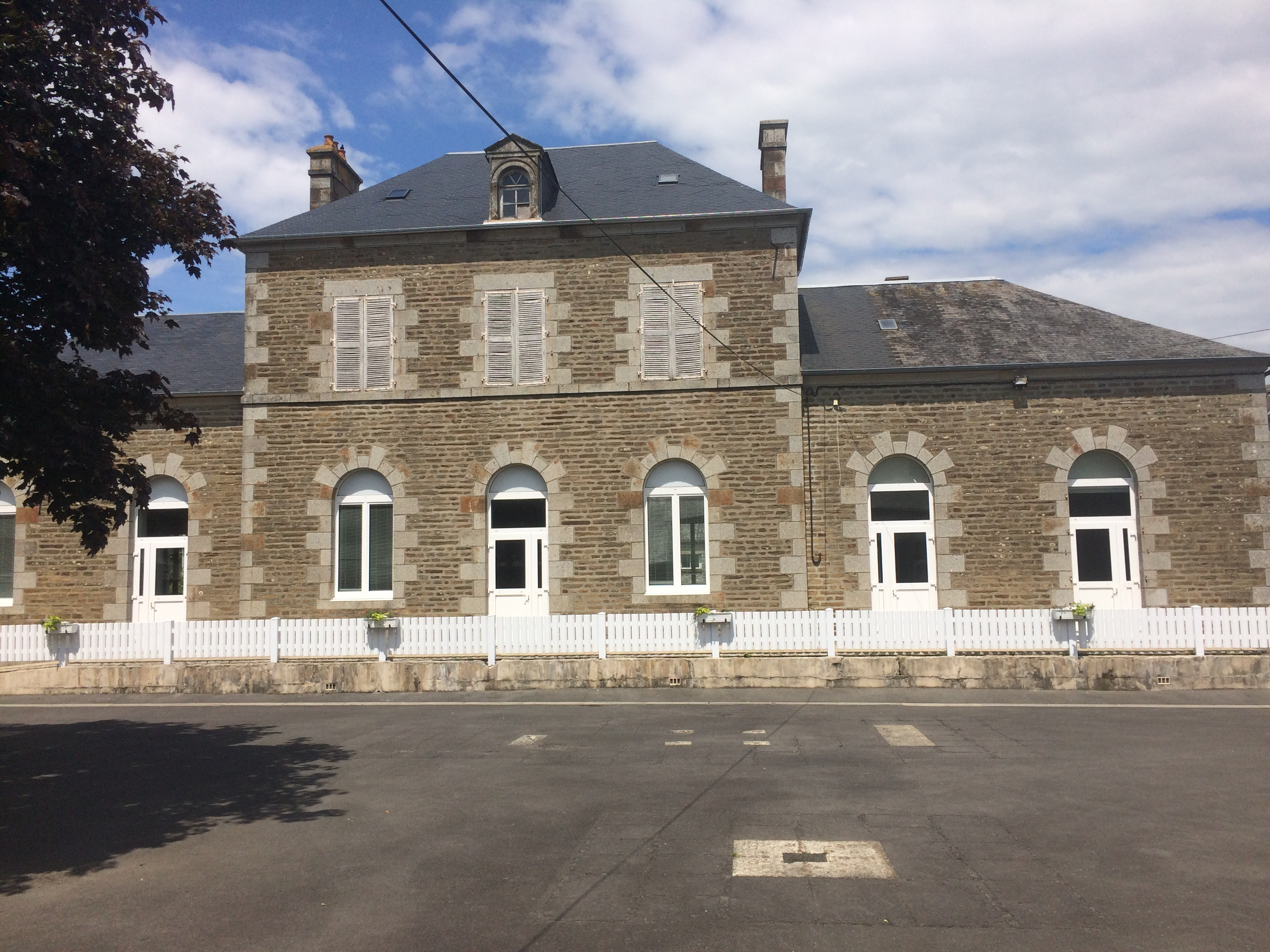 Le bâtiment de l'école publique